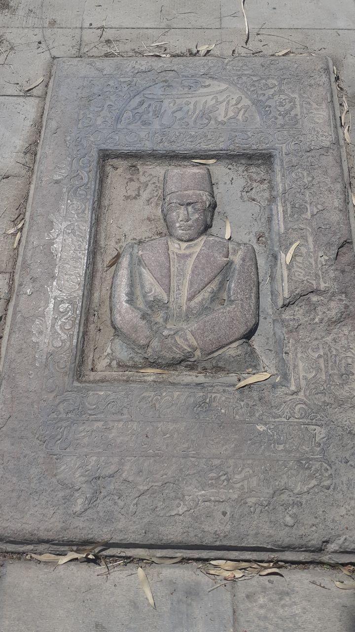 نابودی سنگ قبر های قدیمی با بی مسئولیتی متولیان قبرستان ابن بابویه